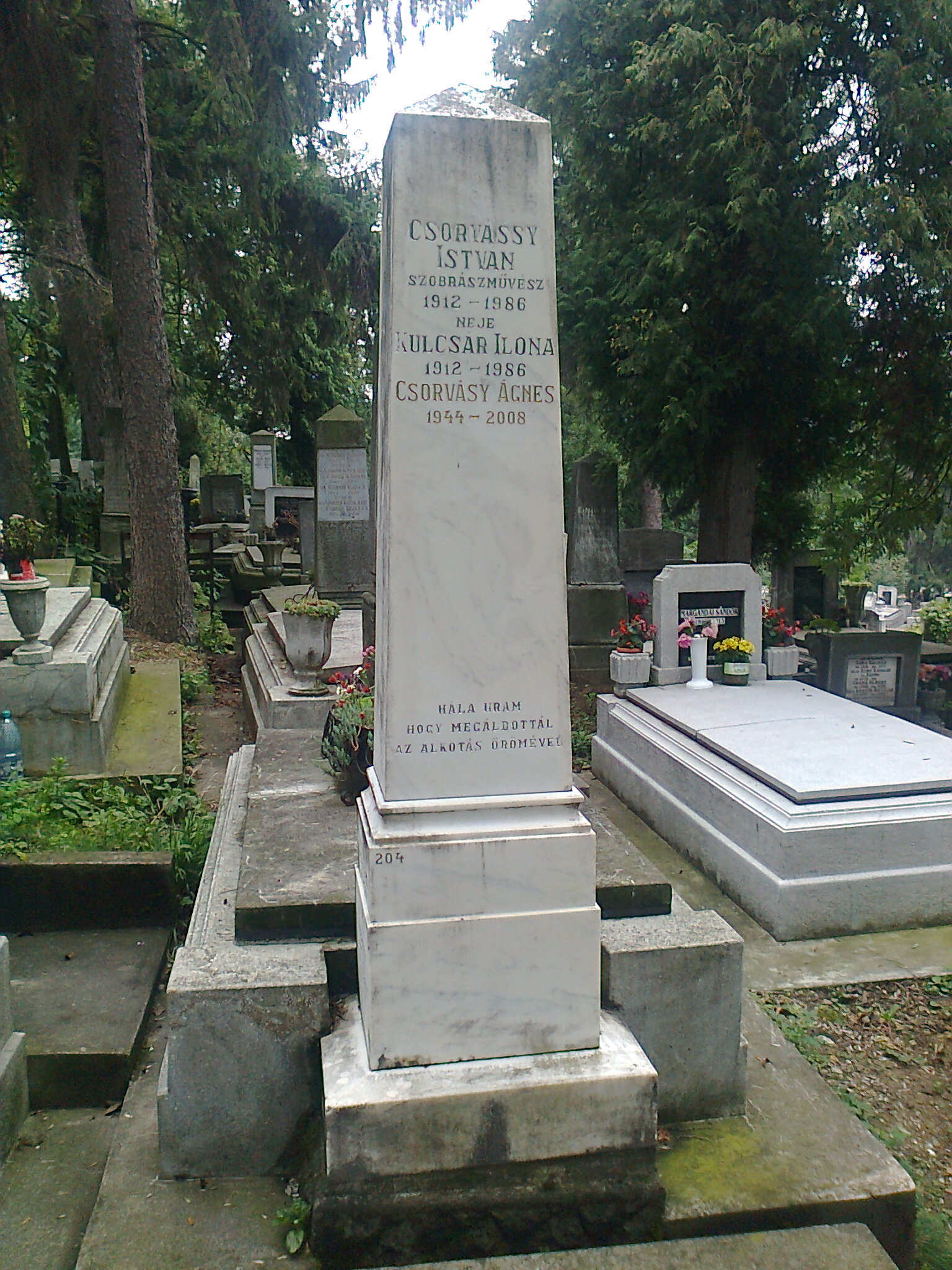 Csorvássy István szobrász sírja a marosvásárhelyi református temetőben